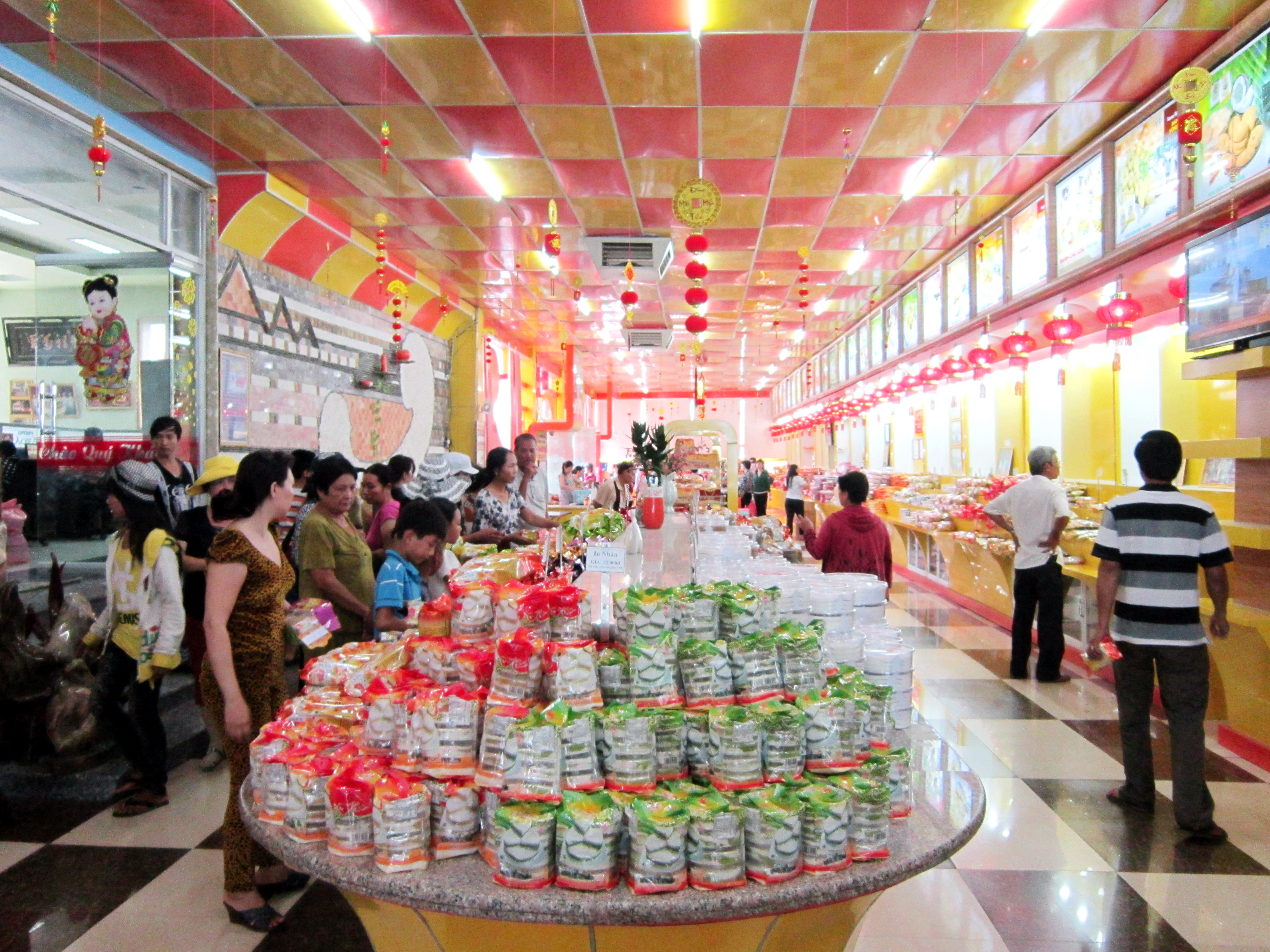 Một cửa hàng bán trà, bánh tại thành phố Sóc Trăng (Việt Nam). Đặc biệt, ở đây có bán bánh pía đủ loại, một đặc sản lâu đời và nổi tiếng của tỉnh.